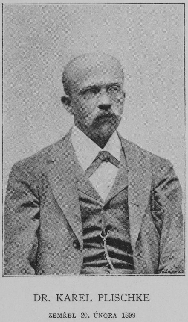 Portrait of Karel Plischke, Czech ehtnographer.